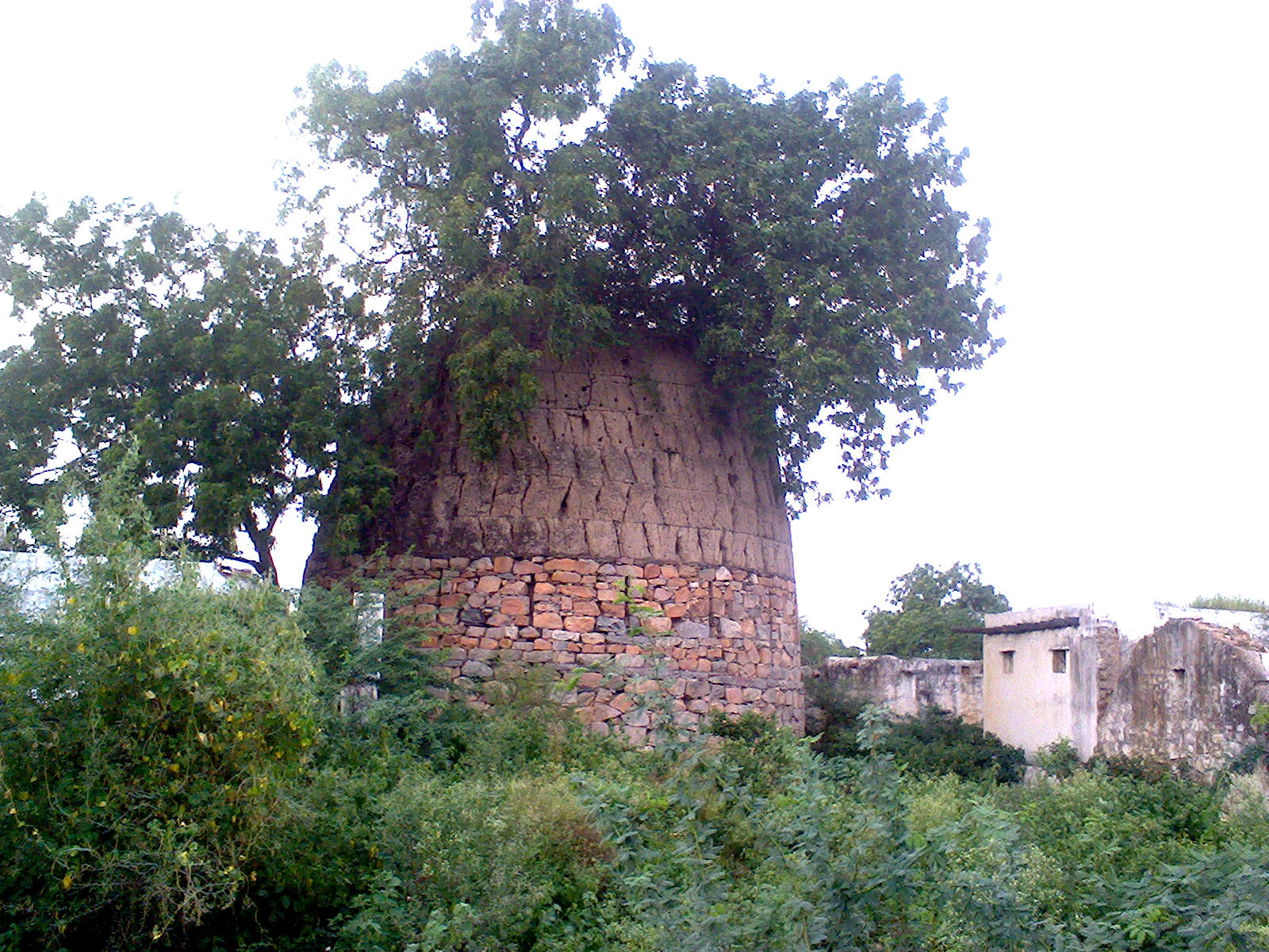 గ్రామంలో కోట బురుజు